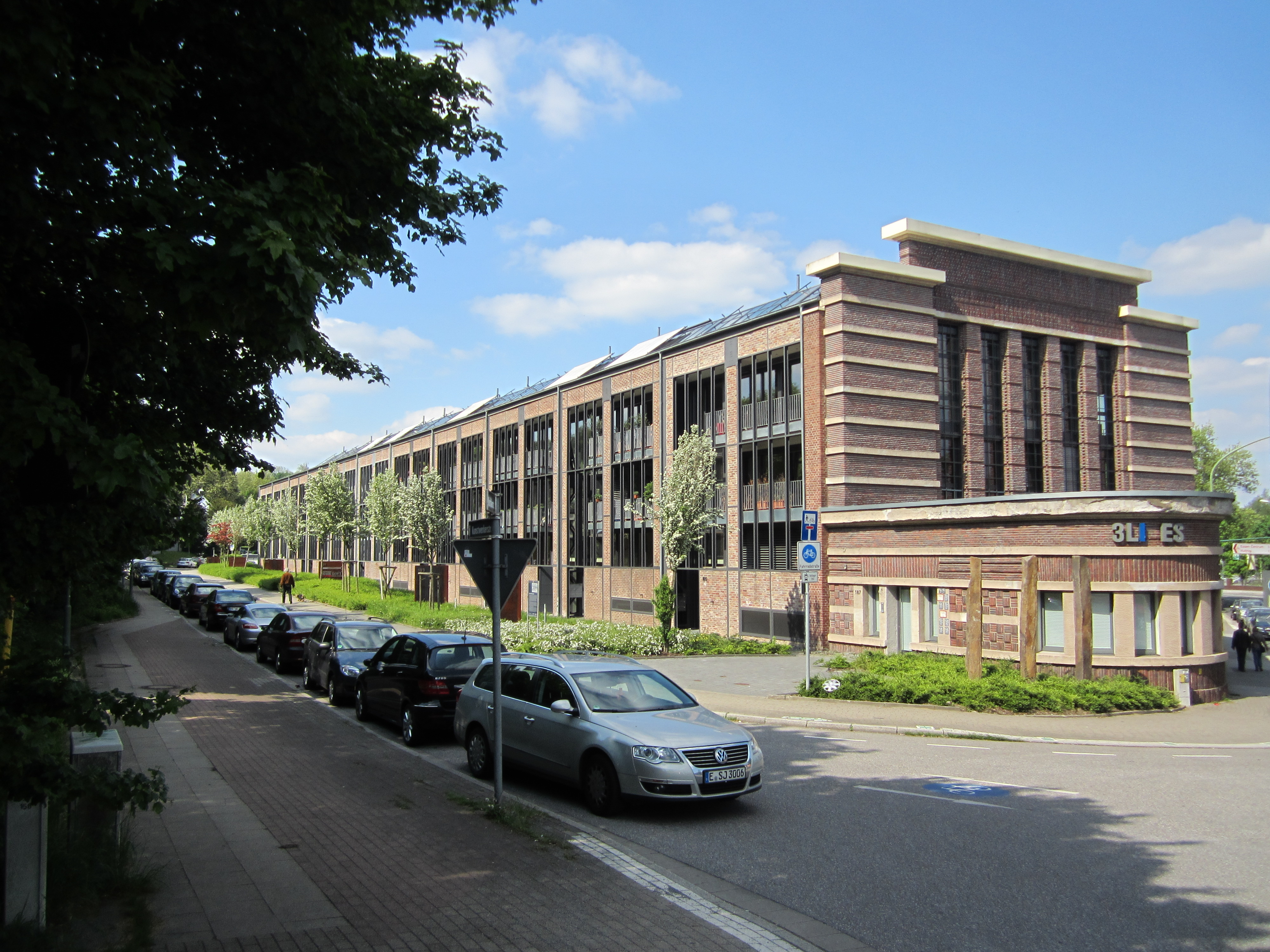 ehem. Fabrikgebäude (Werk Dinnendahl) in Essen-Bergerhausen, heute Wohnungen; Blick von der Westfalenstraße aus in die Kunstwerkerstraße